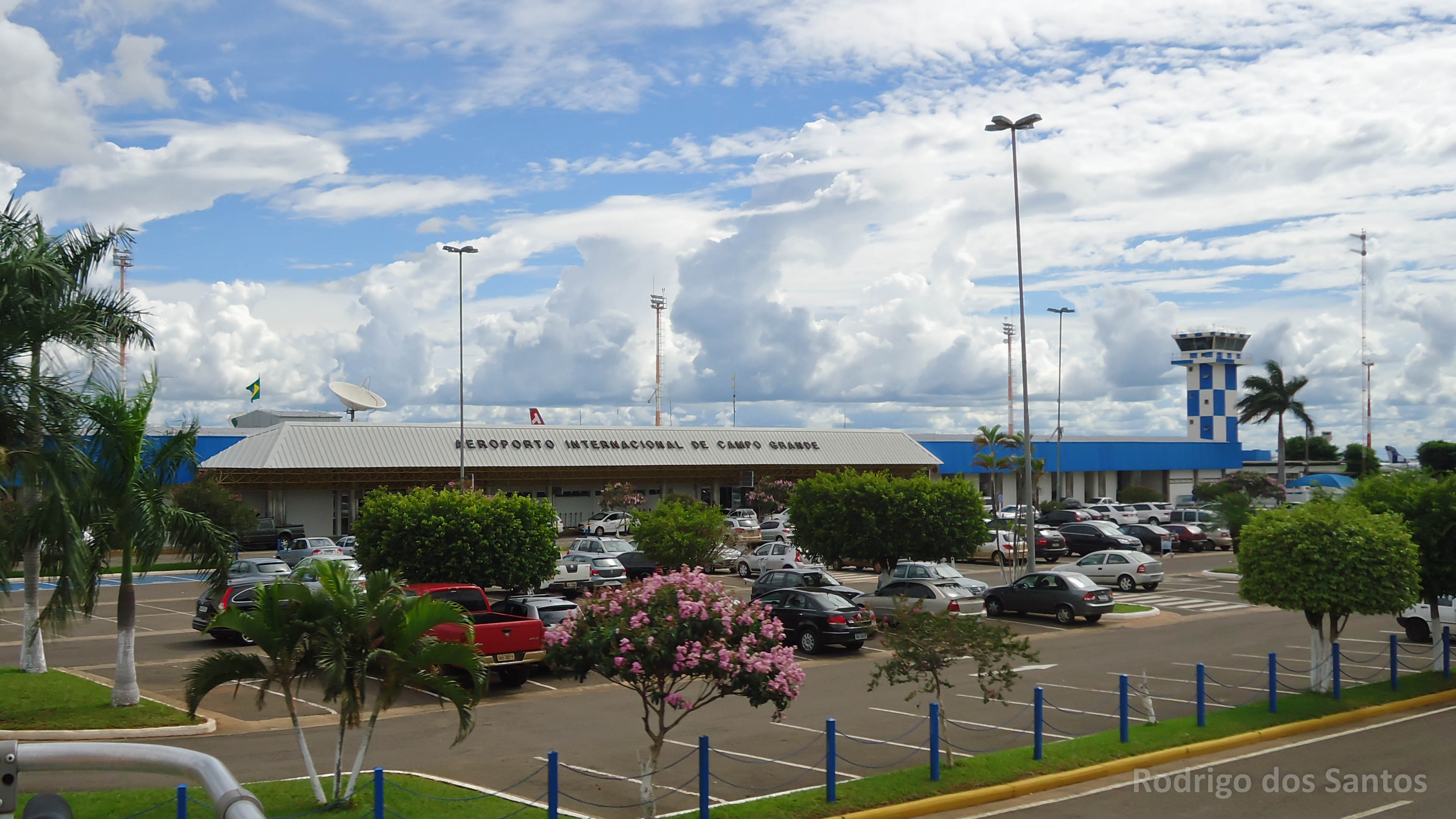 Aeroporto Internacional de Campo Grande